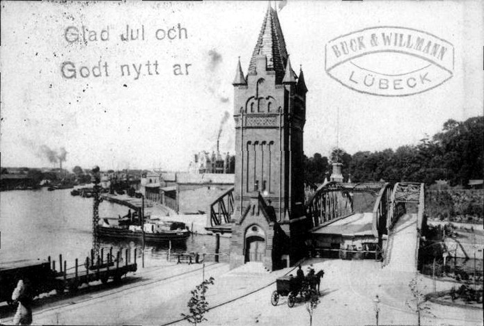 Eine Weihnachten 1913 gelaufene Postkart